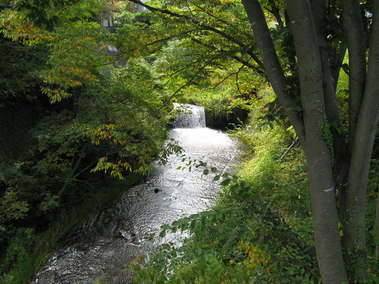 間堀川 金鳥居橋から上流方を望む